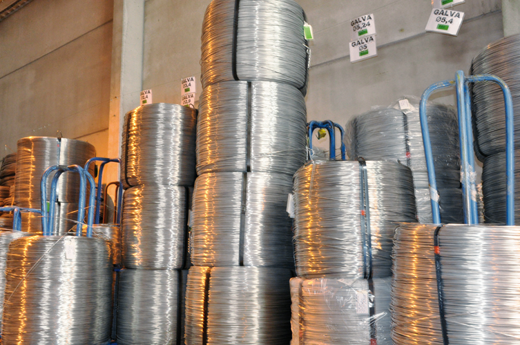 Bobines de fils métalliques